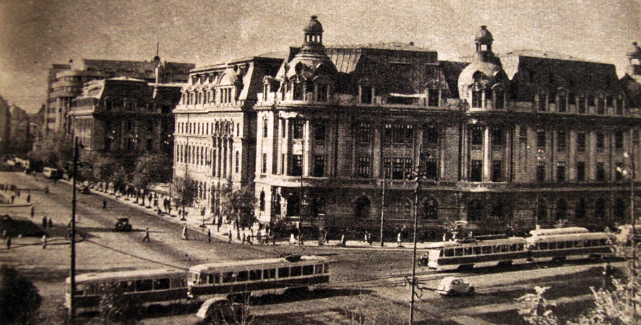 Universitatea Bucuresti